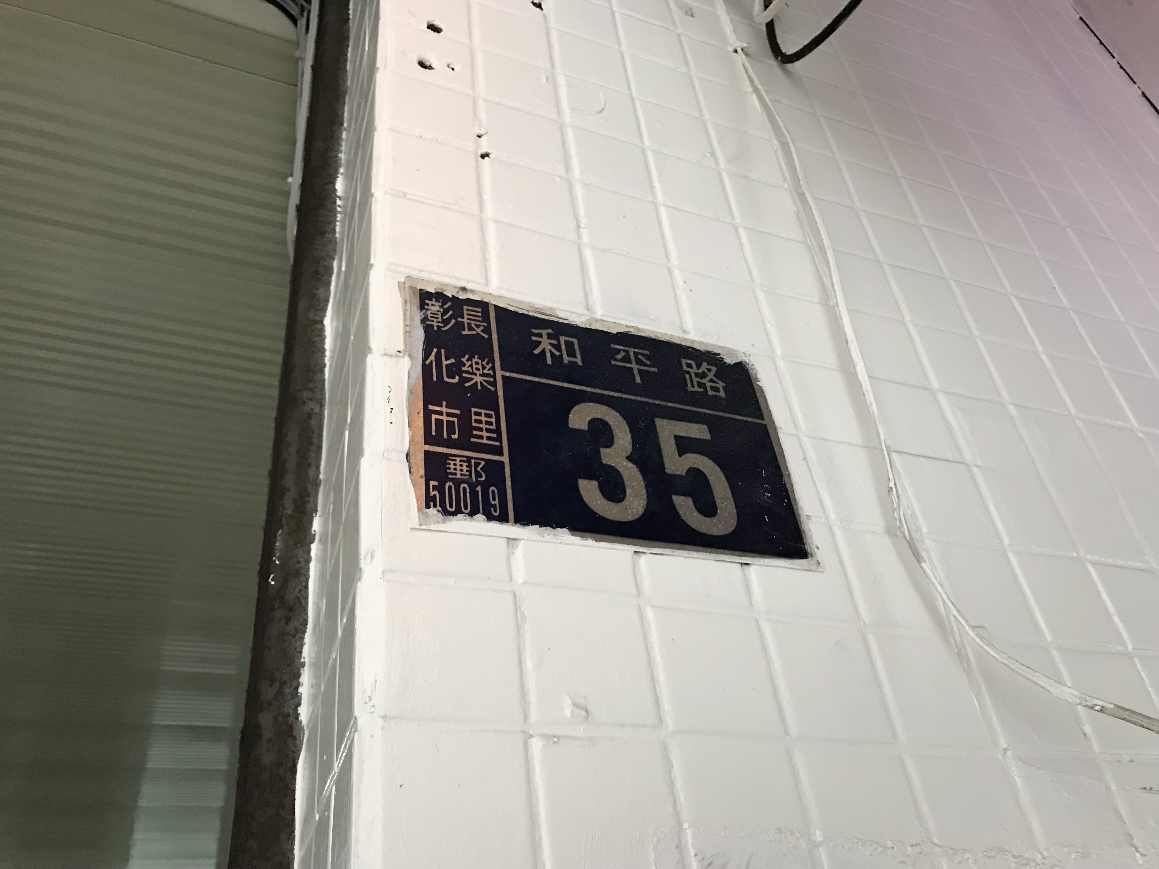 中文（台灣）: 彰化北門福德祠門牌